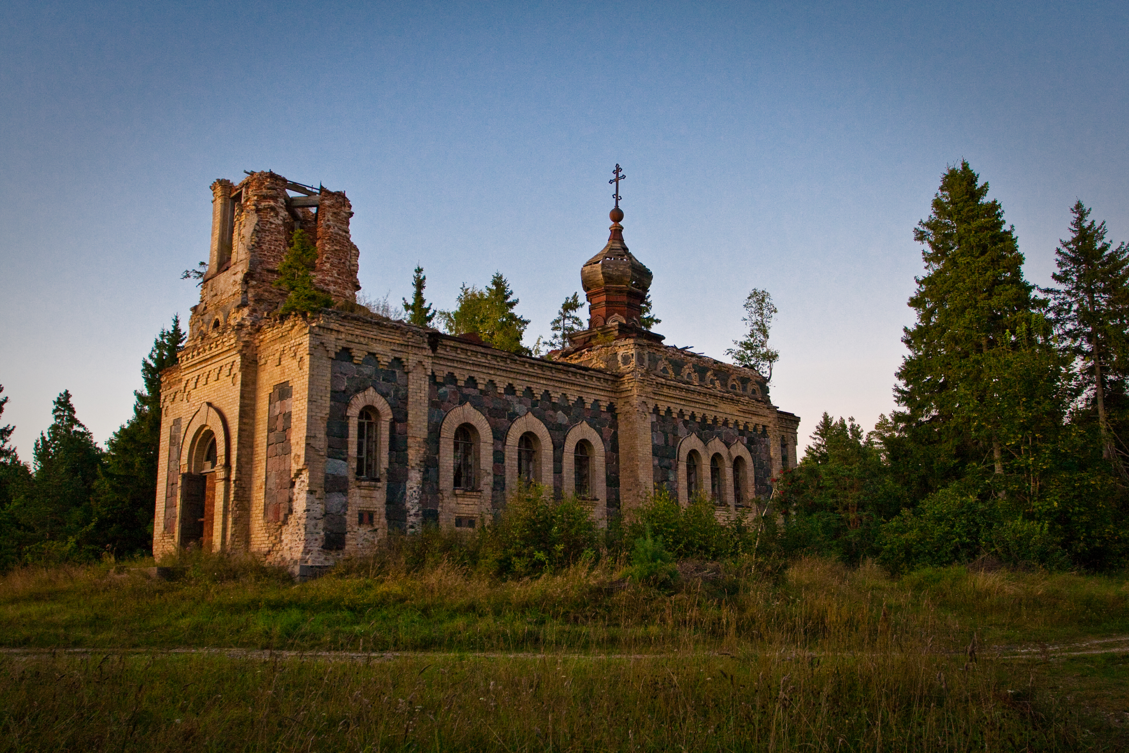 Kuri õigeusu kiriku varemed